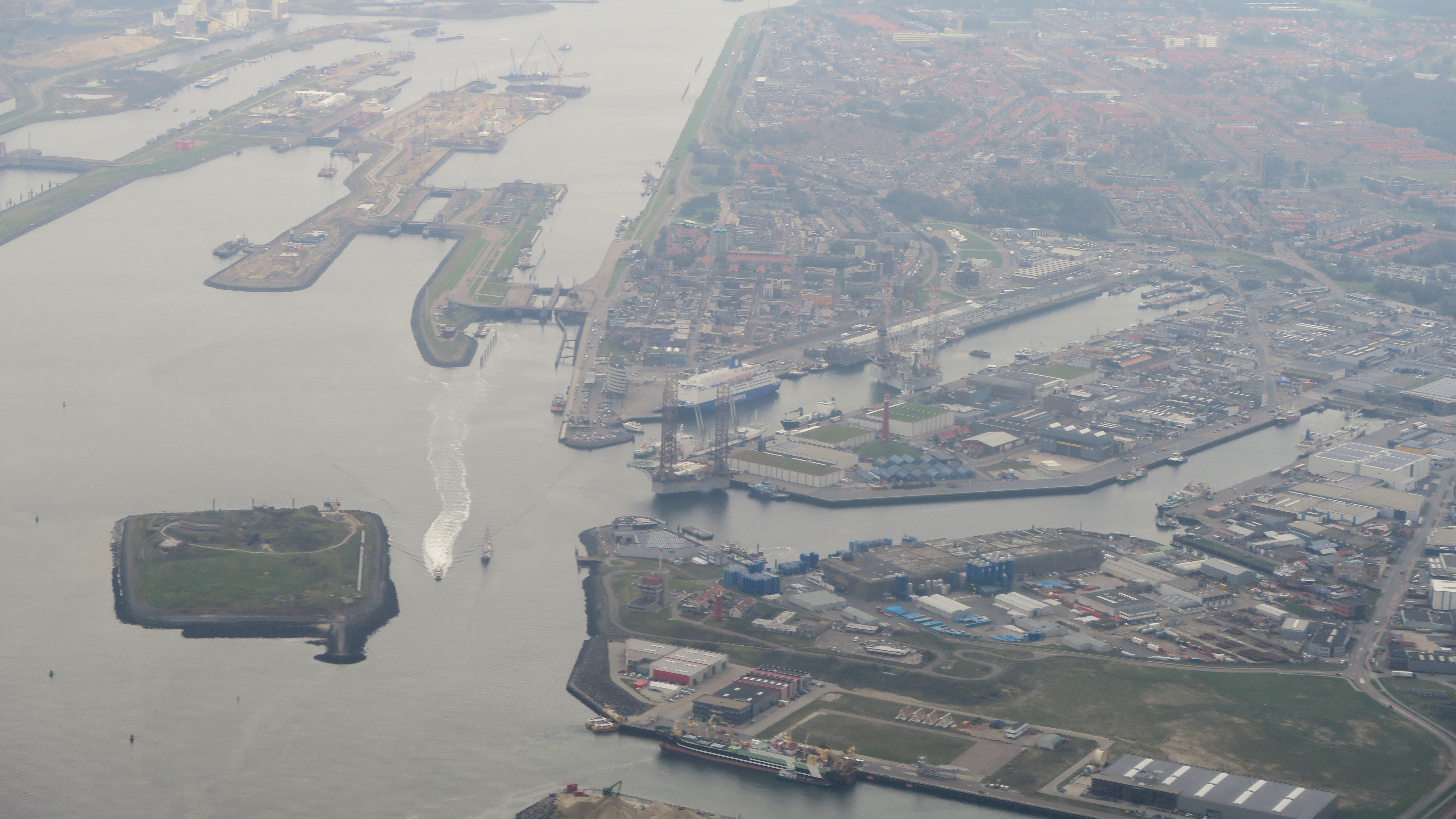 De haven van IJmuiden, gezien naar het oosten